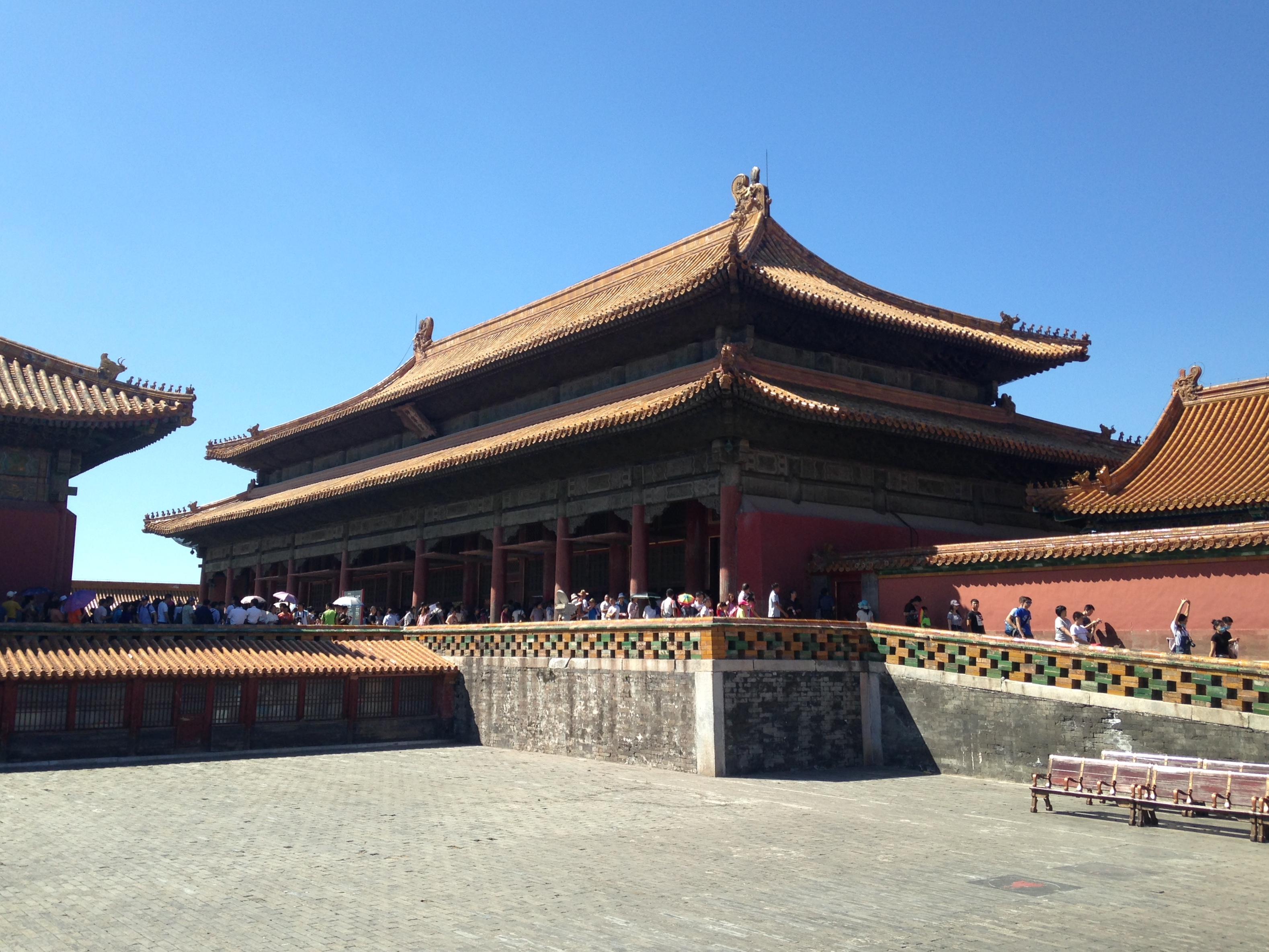 紫禁城・坤寧宮